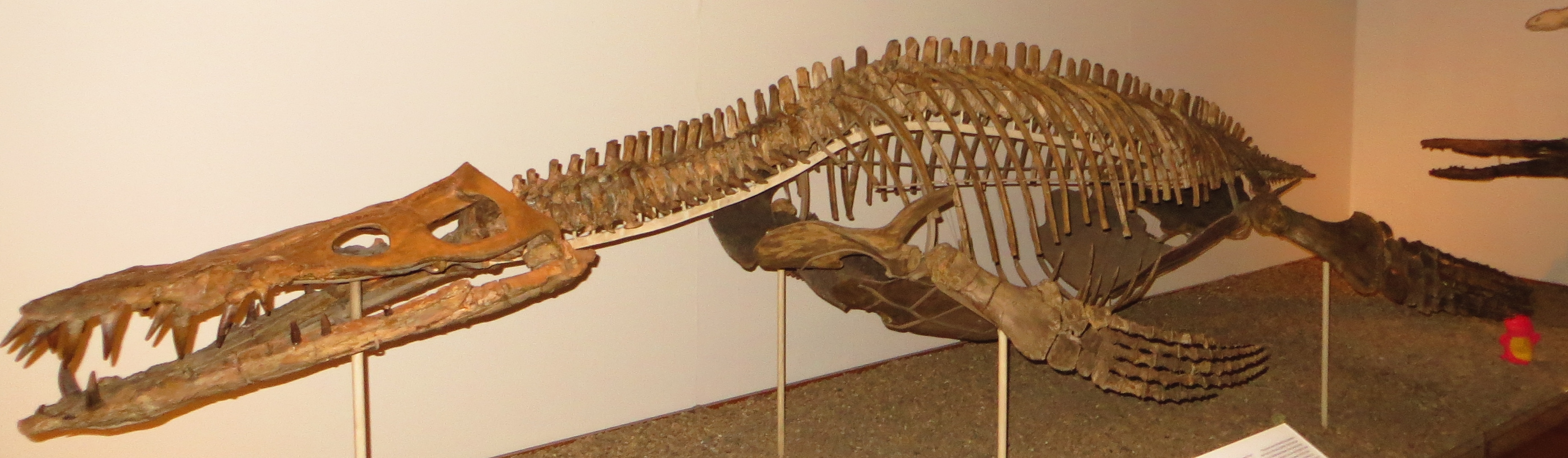 Fossil of Liopleurodon, an extinct reptile - Took the picture at Museum of Paleontology, Tuebingen